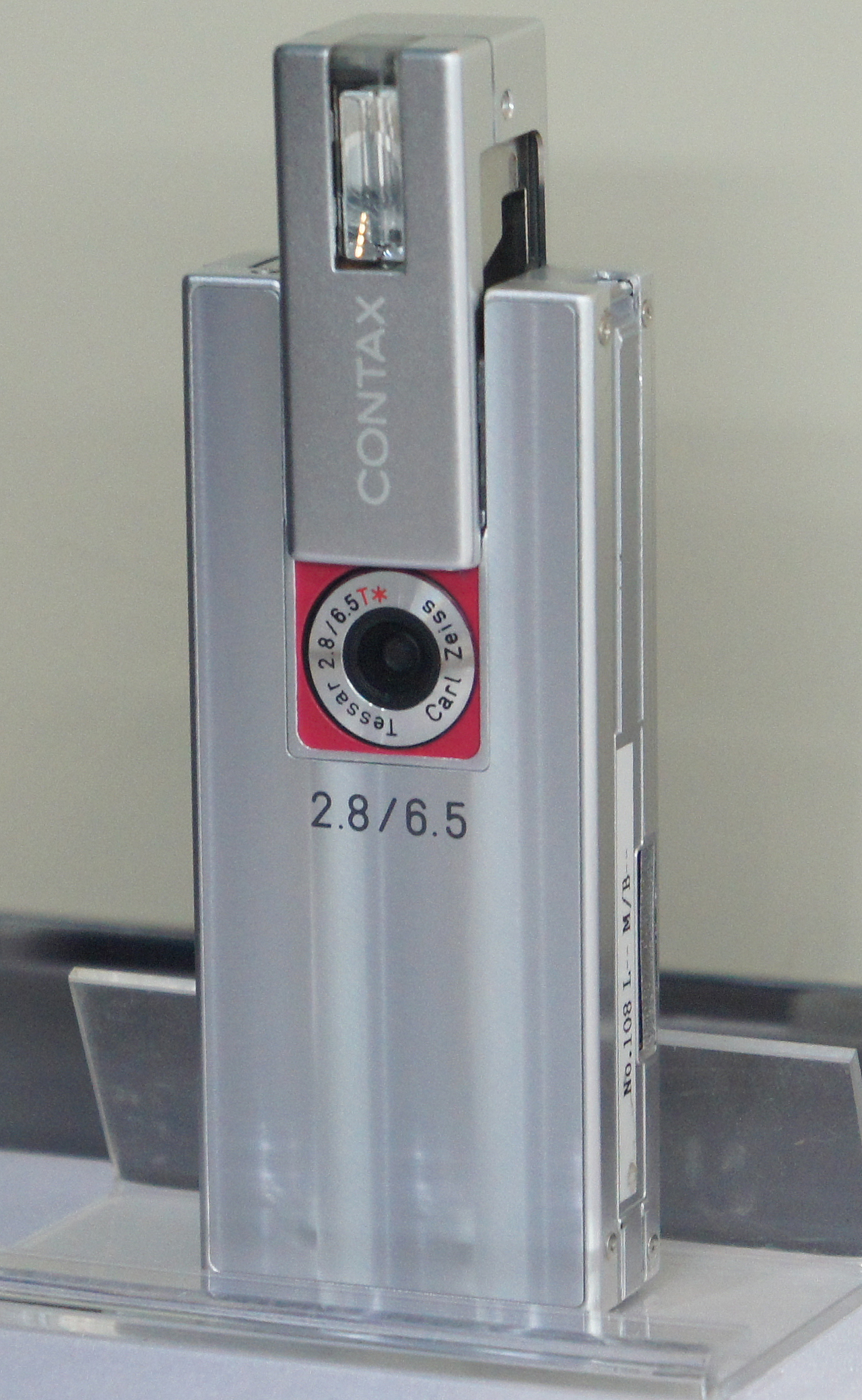 CP+ 2011: 2004 Contax i4R